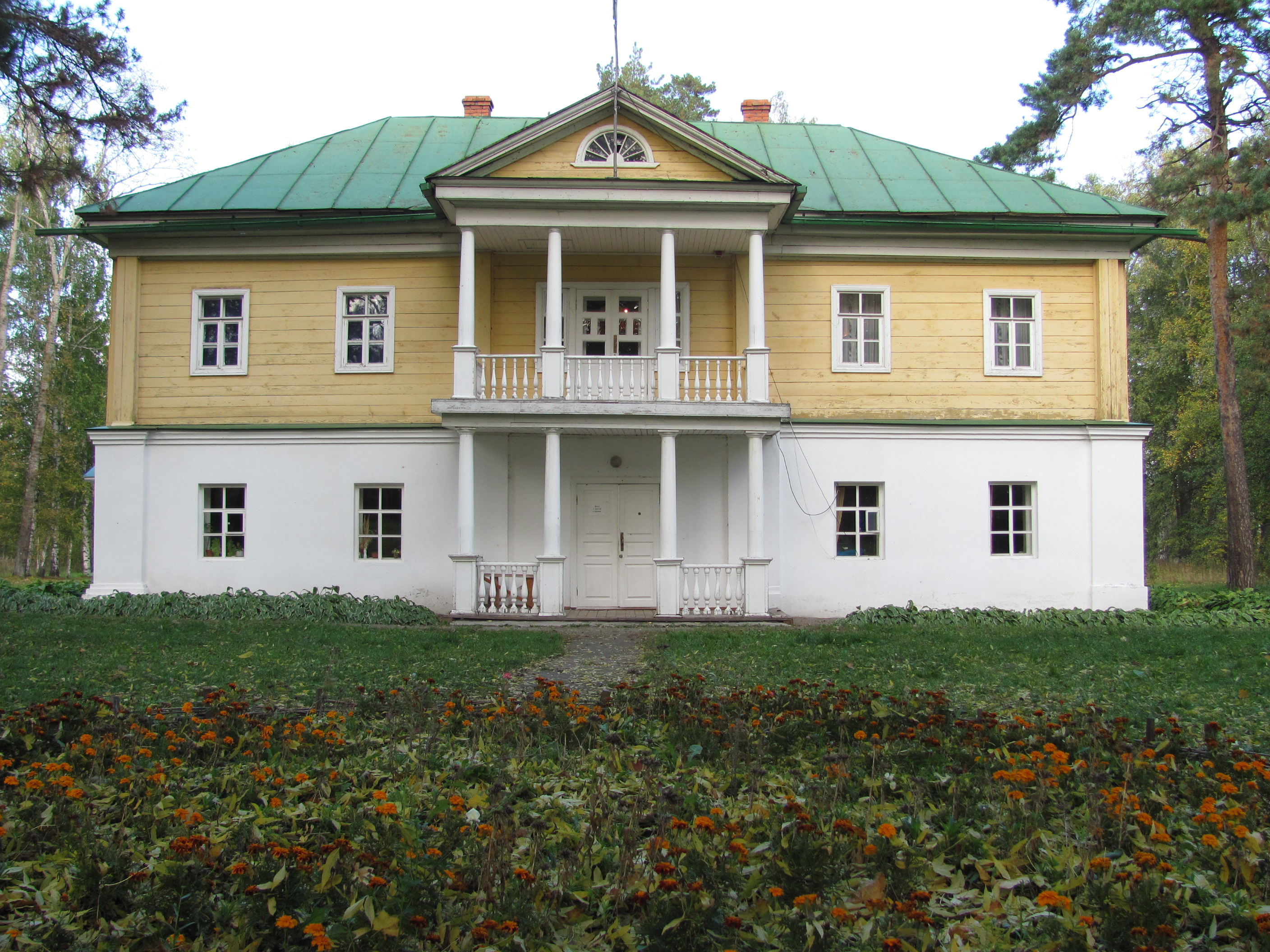 Барский дом во Львовке, усадьба А. А. Пушкина (Большеболдинский район, Нижегородская область, Россия)